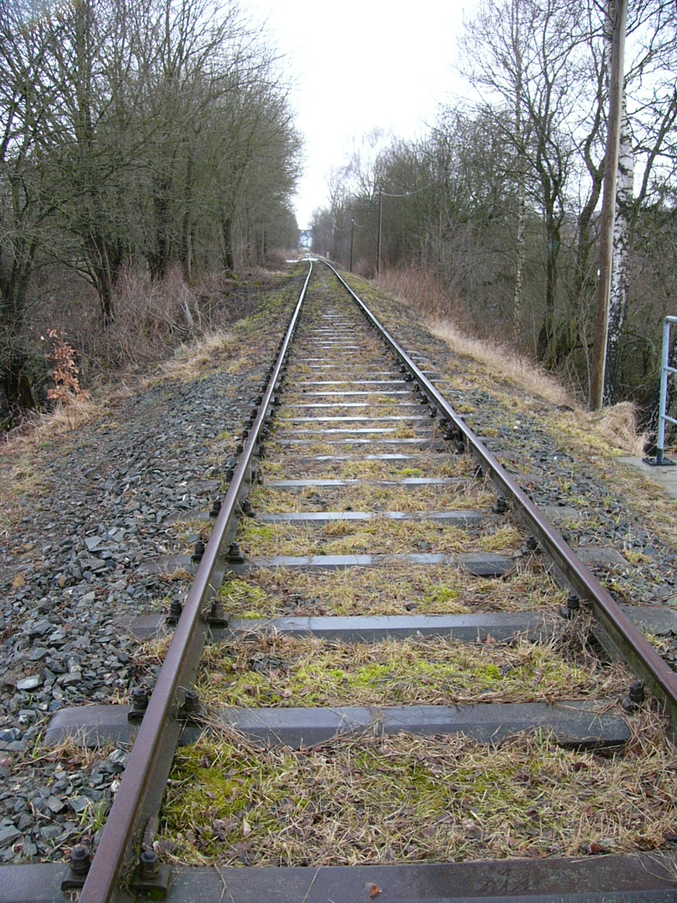 Reststück der Linie von Münchberg Bahnhof zum E-werk.